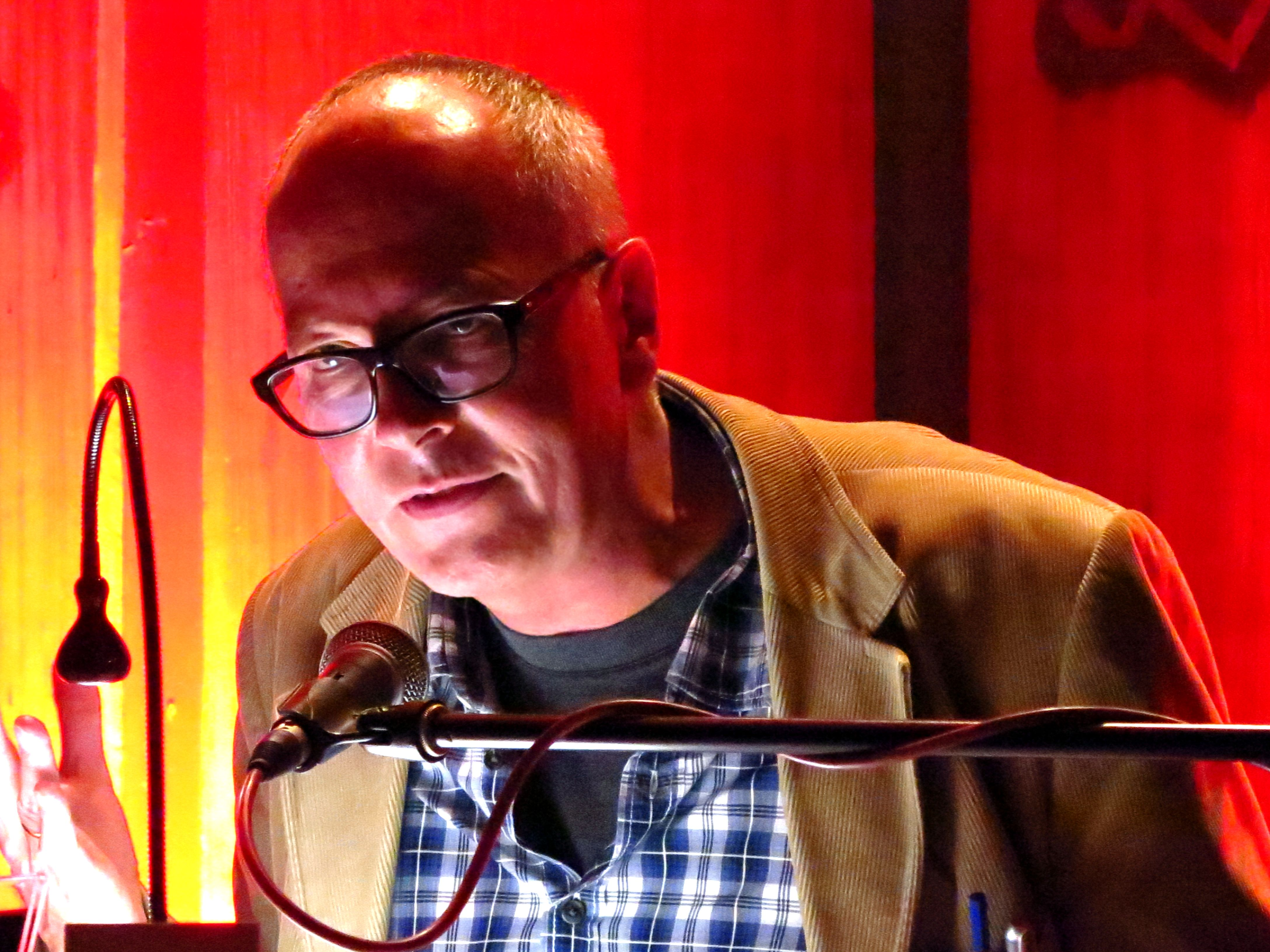 Andreas Föhr, anlässlich der Buchpremiere zu Schwarze Piste am 6. November 2012 im Wappensaal des Hofbräuhauses am Platzl im Rahmen des Münchner Krimifestivals.